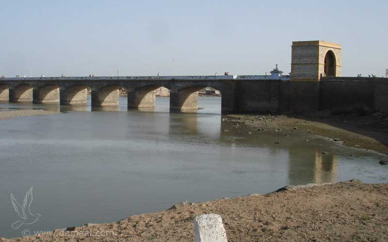 Mandvi Bridge over Rukmavati